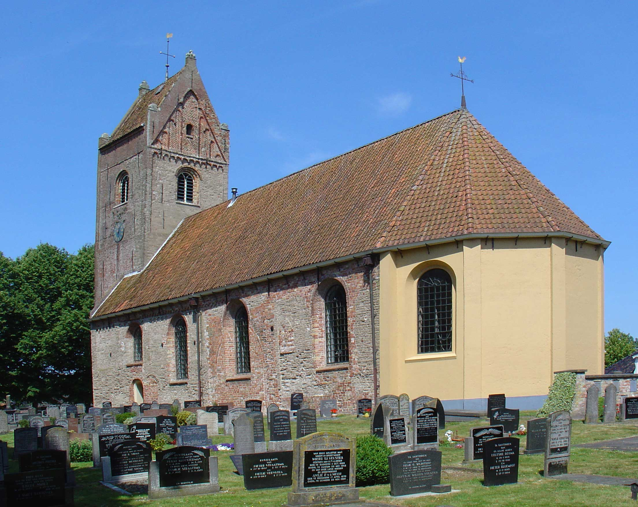 Pauluskerk van Oudkerk/Aldtsjerk